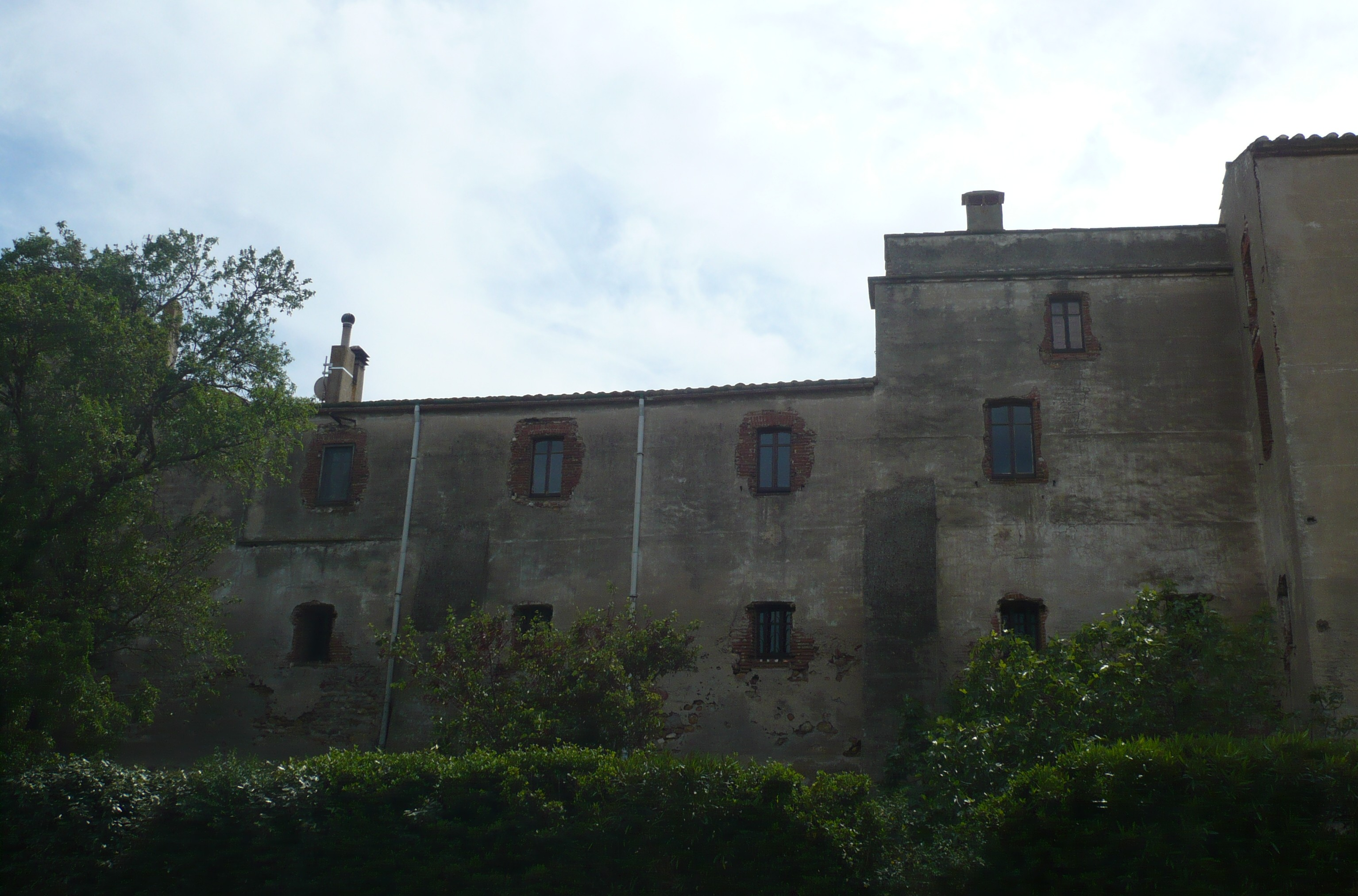 Façade nord-est du château de Corneilla-del-Vercol